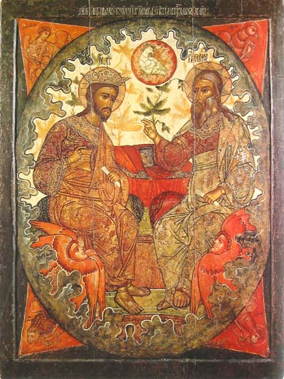 Троица Новозаветная. Середина XVII в. 114 × 87 см. Центральный музей древнерусского искусства им. Андрея Рублева, Москва, Россия